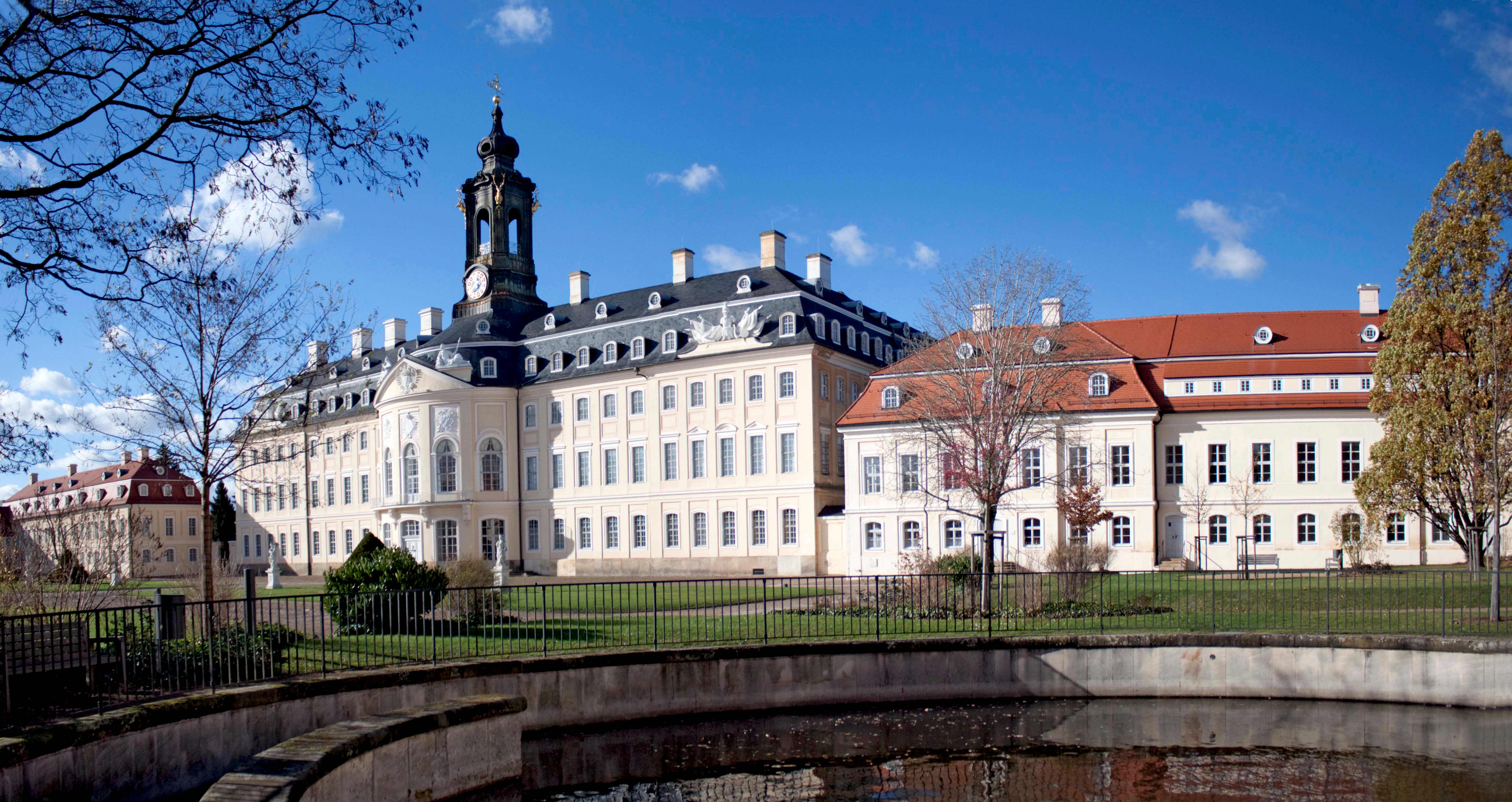 Schloss Hubertusburg, Hubertusburg 1 in Wermsdorf